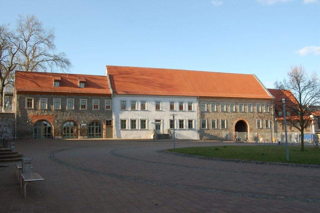 Althaldensleben, ehemaliger Wirtschaftshof